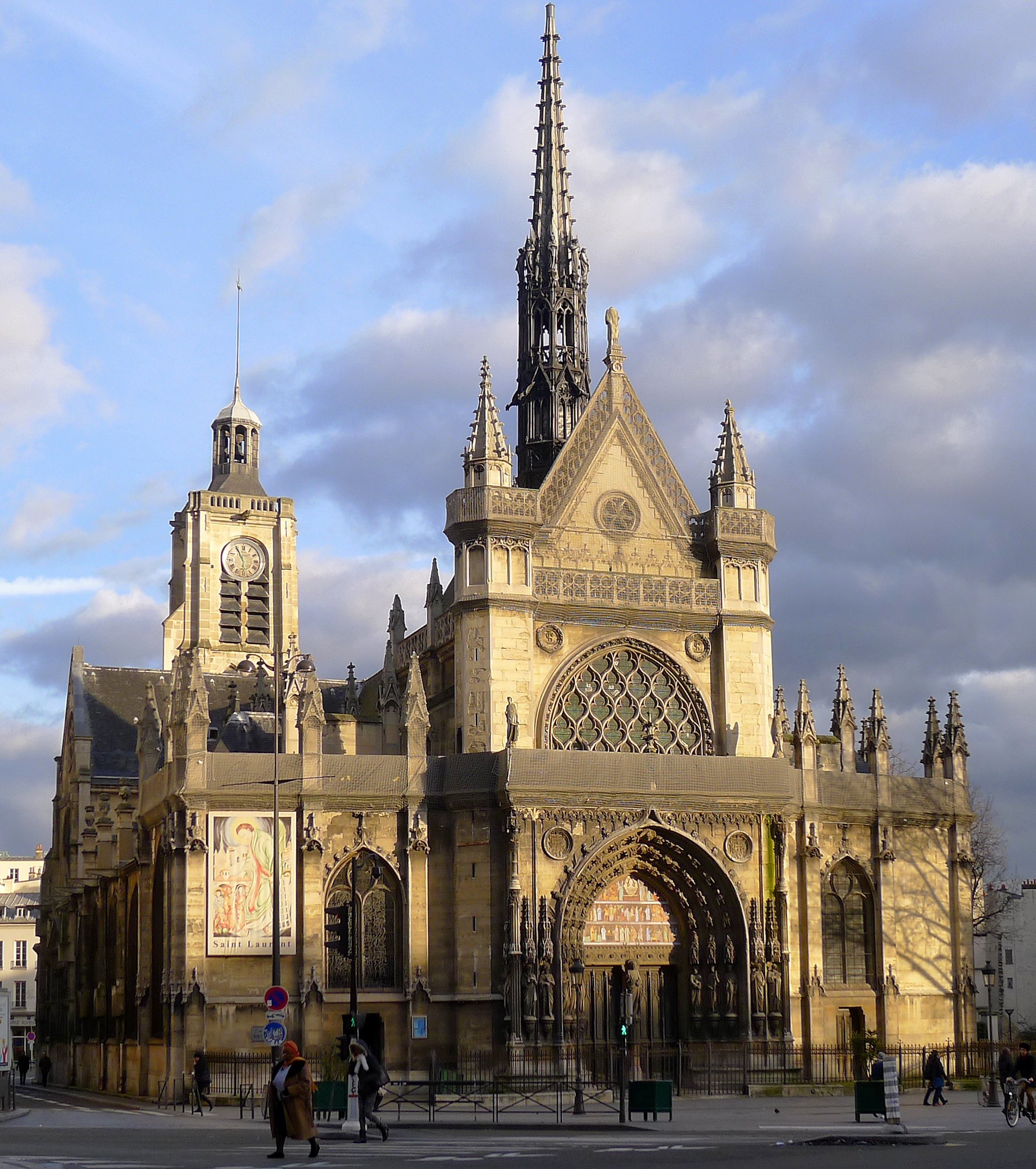 Église Saint-Laurent (façade ouest) - Paris X